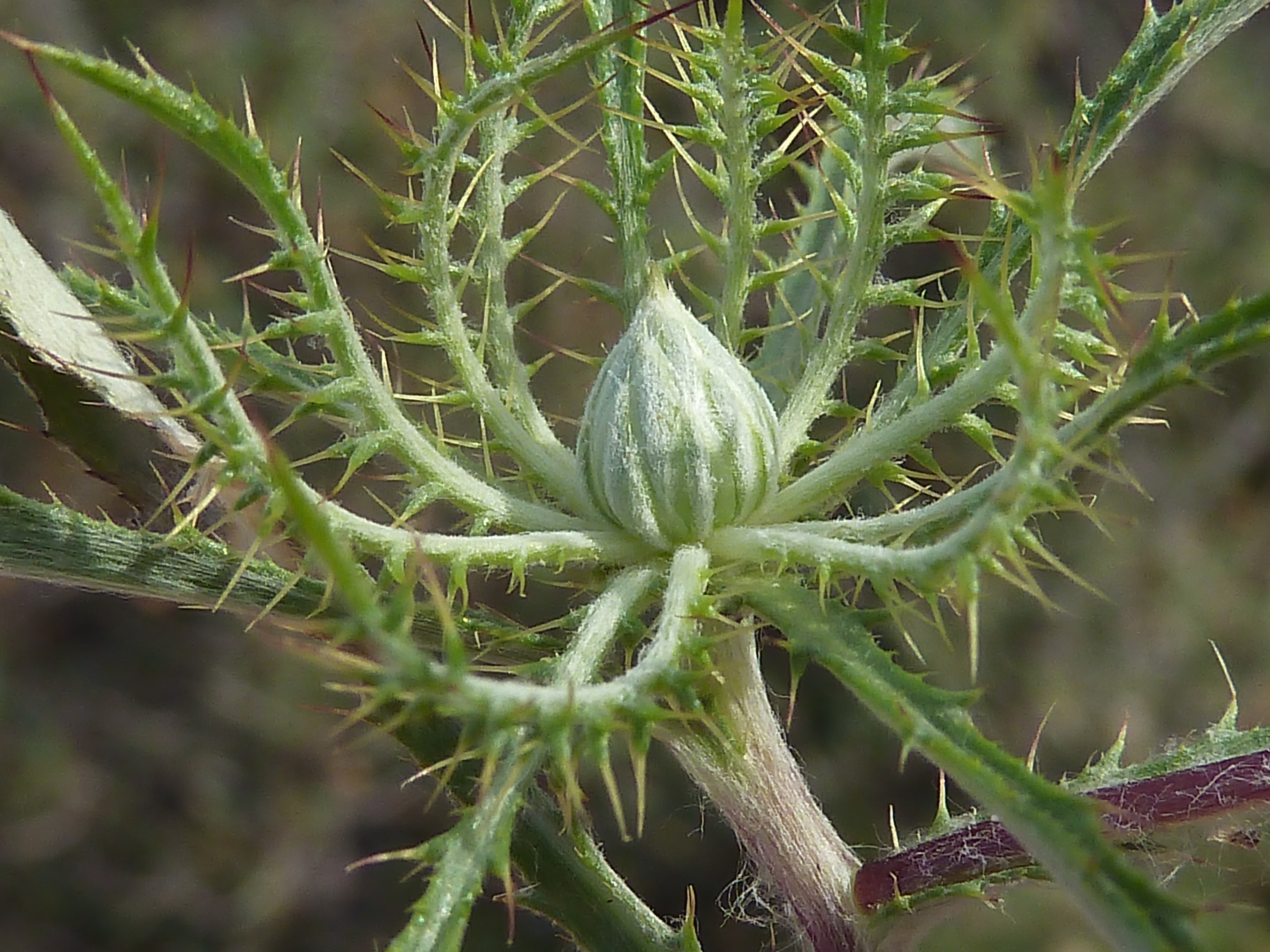 Atractylis cancellata (cancelillos, cardo enrejado,...) - Capítulo en preantesis con hojas involucrales. circa Villa Suzana, Colonia Illicitana, Albatera (Provincia de Alicante, España).